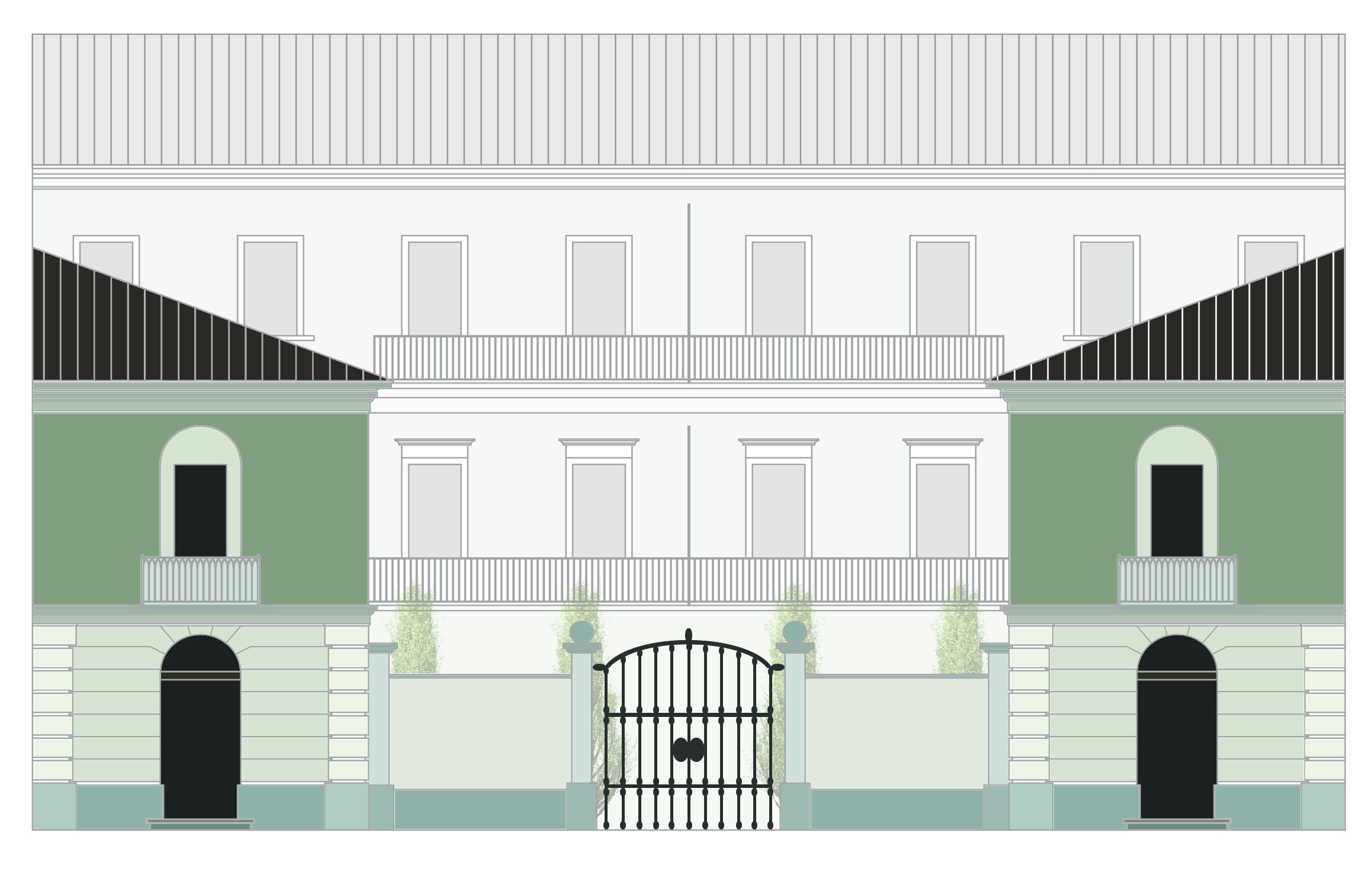 Il prospetto storico del Palazzo Forneris di Torino